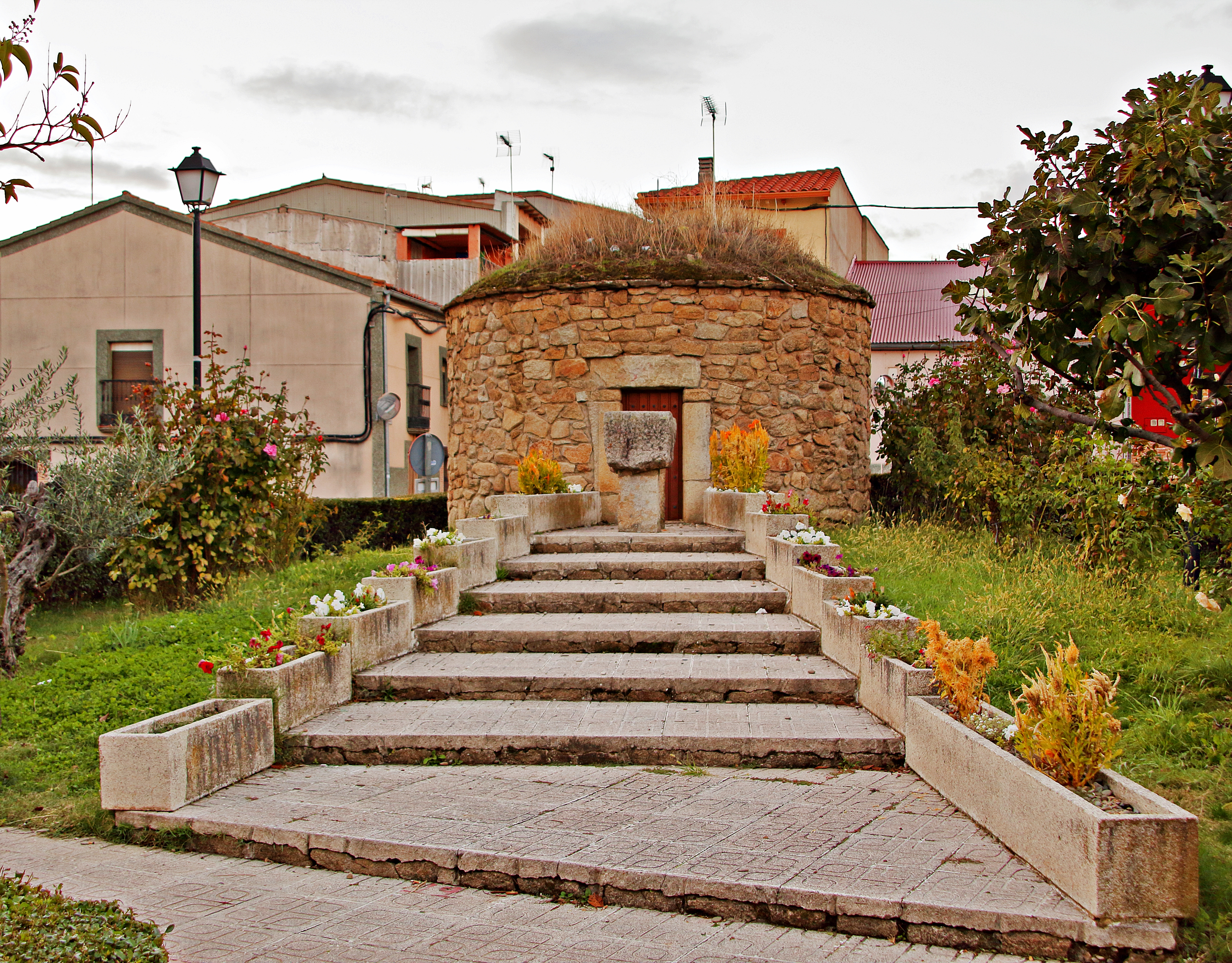 Ahigal, municipio de la comarca de Trasierra-Tierra de Granadilla, provincia de Cáceres